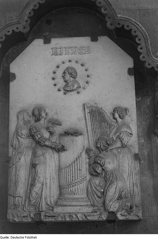 Original image description from the Deutsche FotothekGedenktafel für Johann Adam Hiller, Westgiebel der Thomaskirche